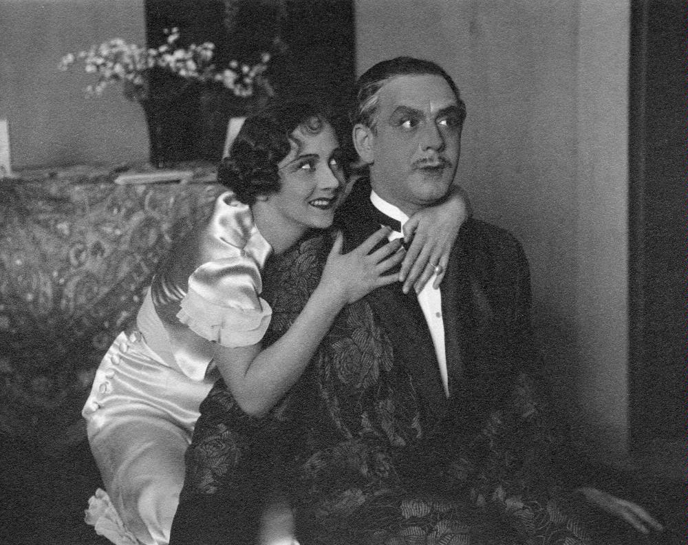 Lena Cederström och Semmy Friedmann. Scenbild ur "Hennes första äventyr", Helsingborgs stadsteater 1931/32.